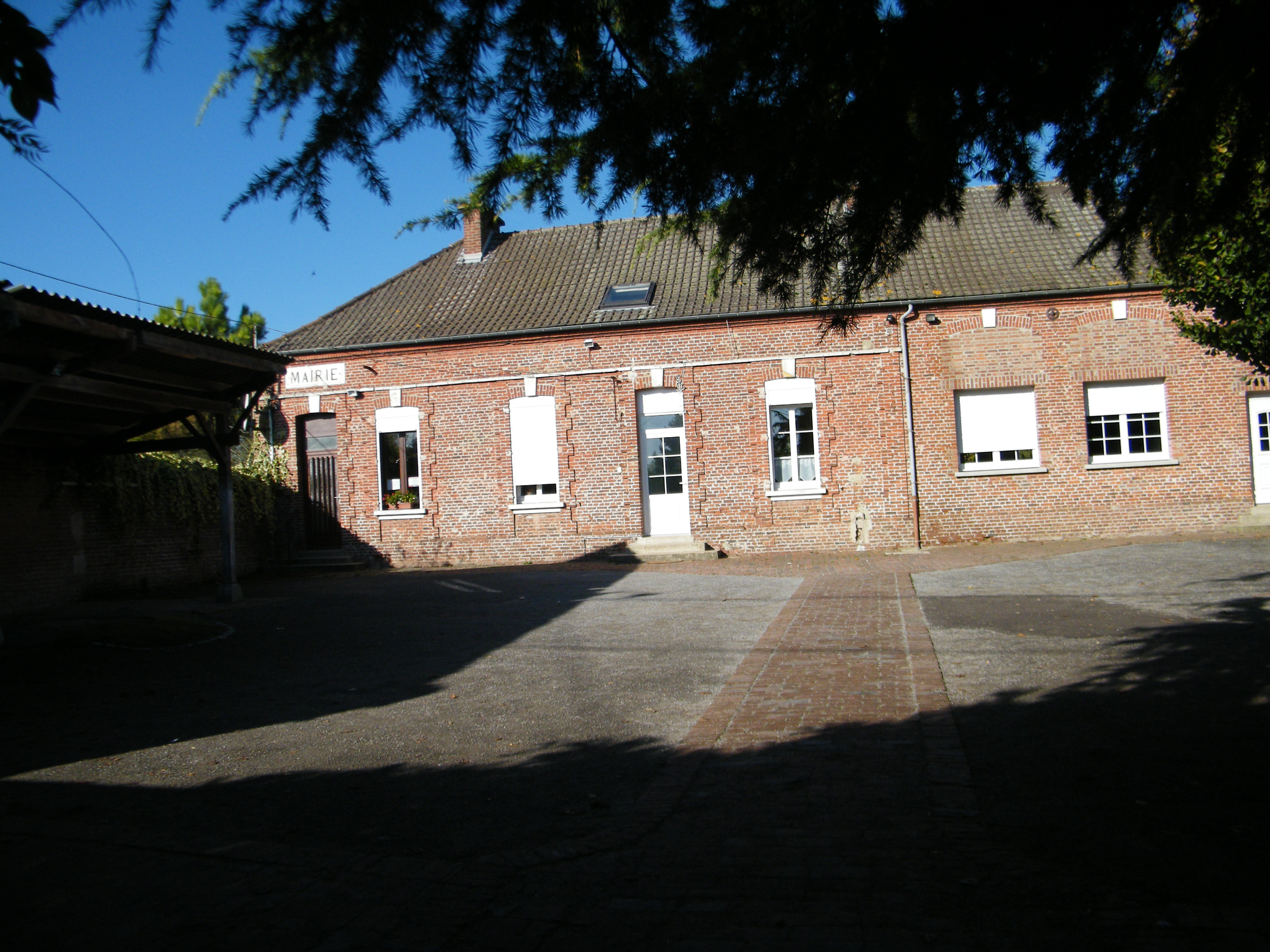 Bâtiments communaux.